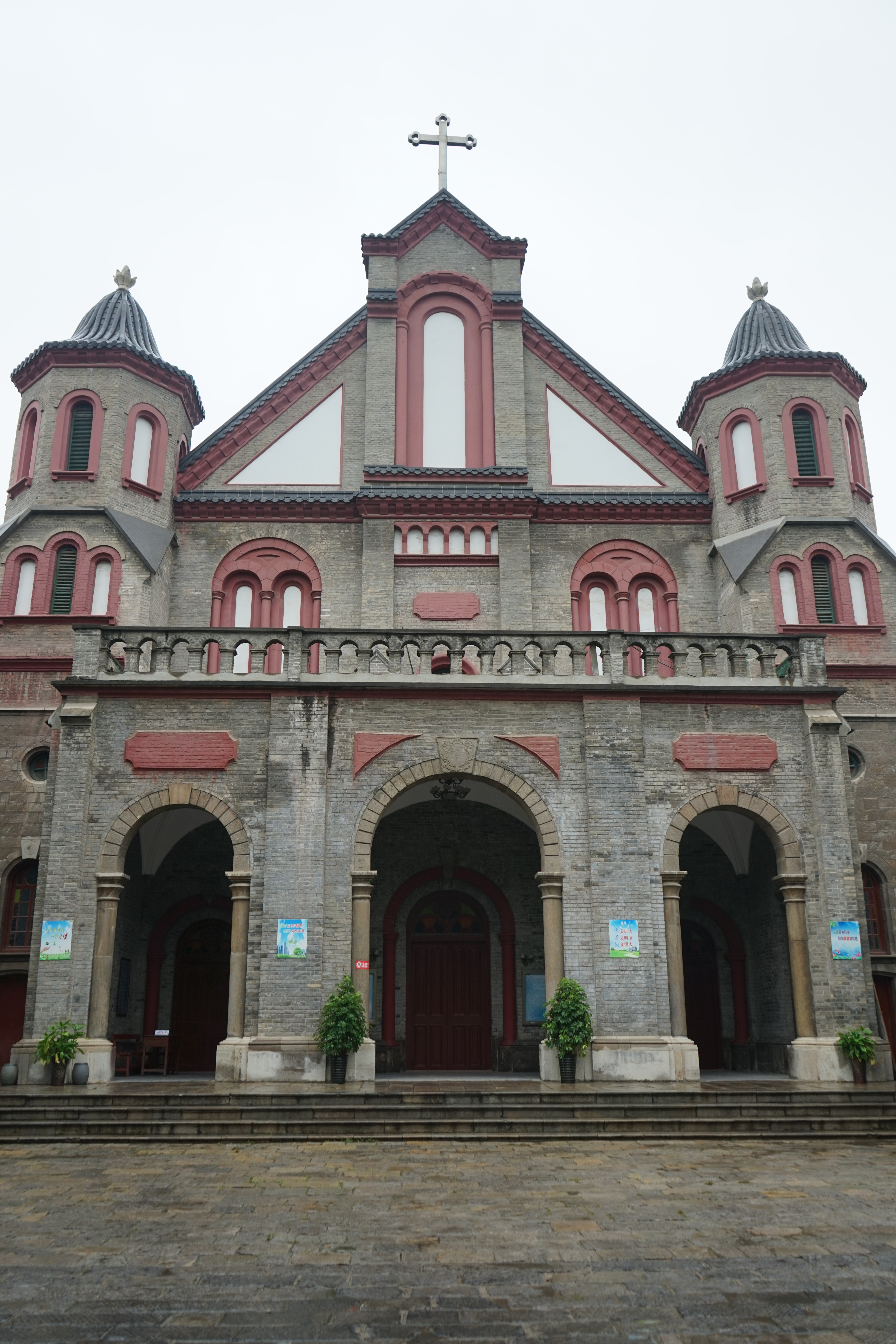 中文（中国大陆）: 徐州耶稣圣心堂 主楼